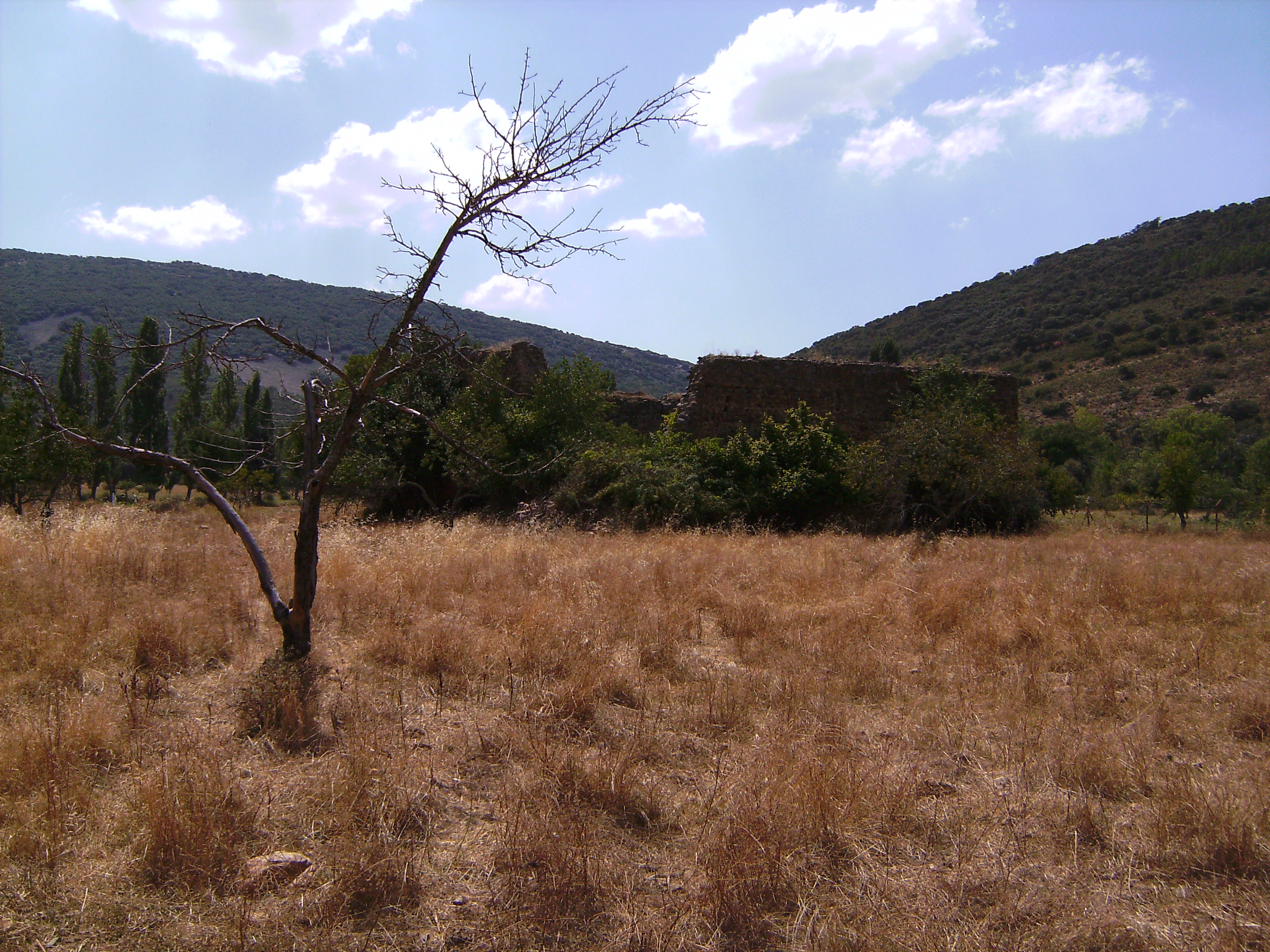 Castillo de Malamoneda